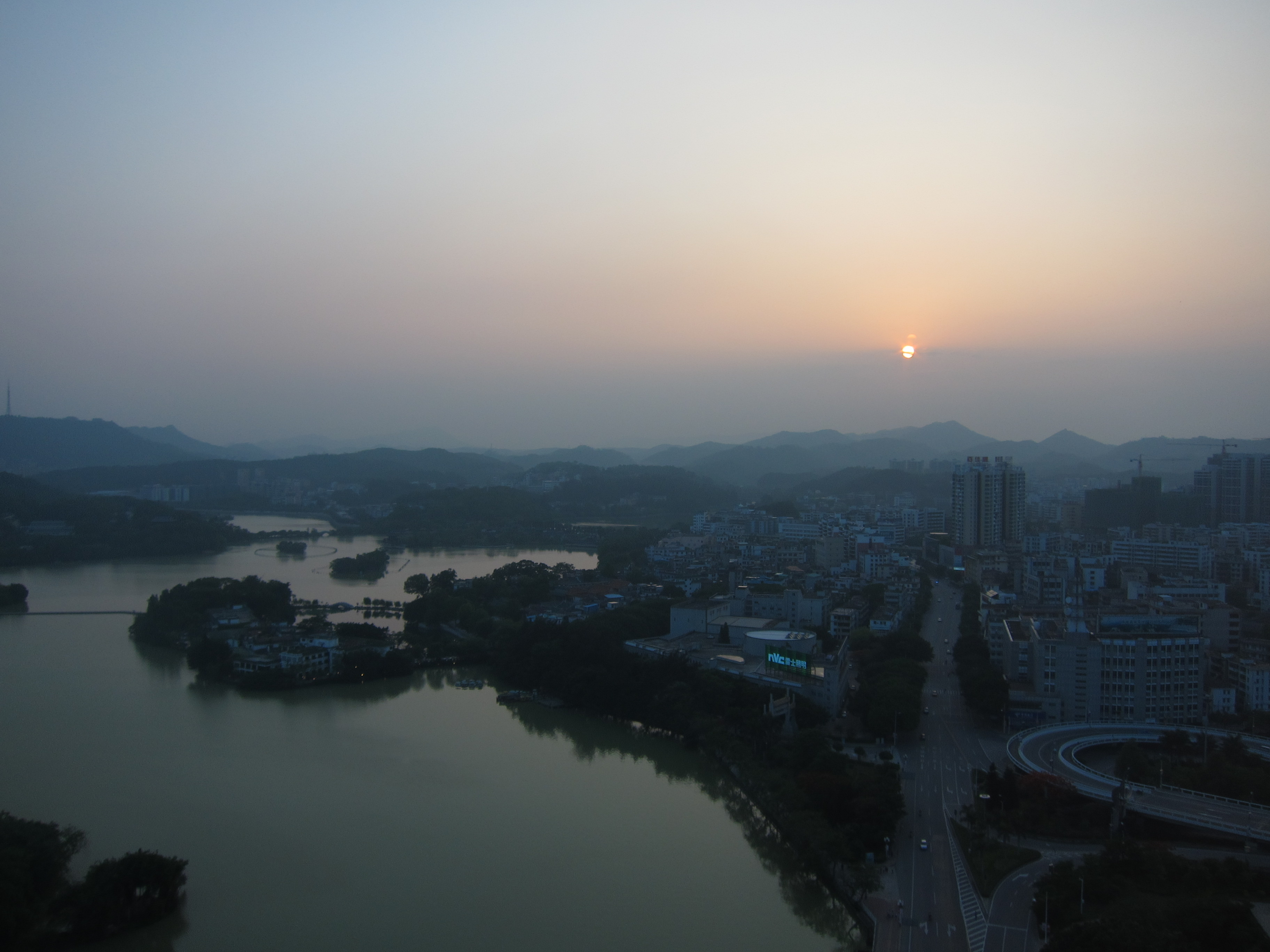 Sunset over Huizhou